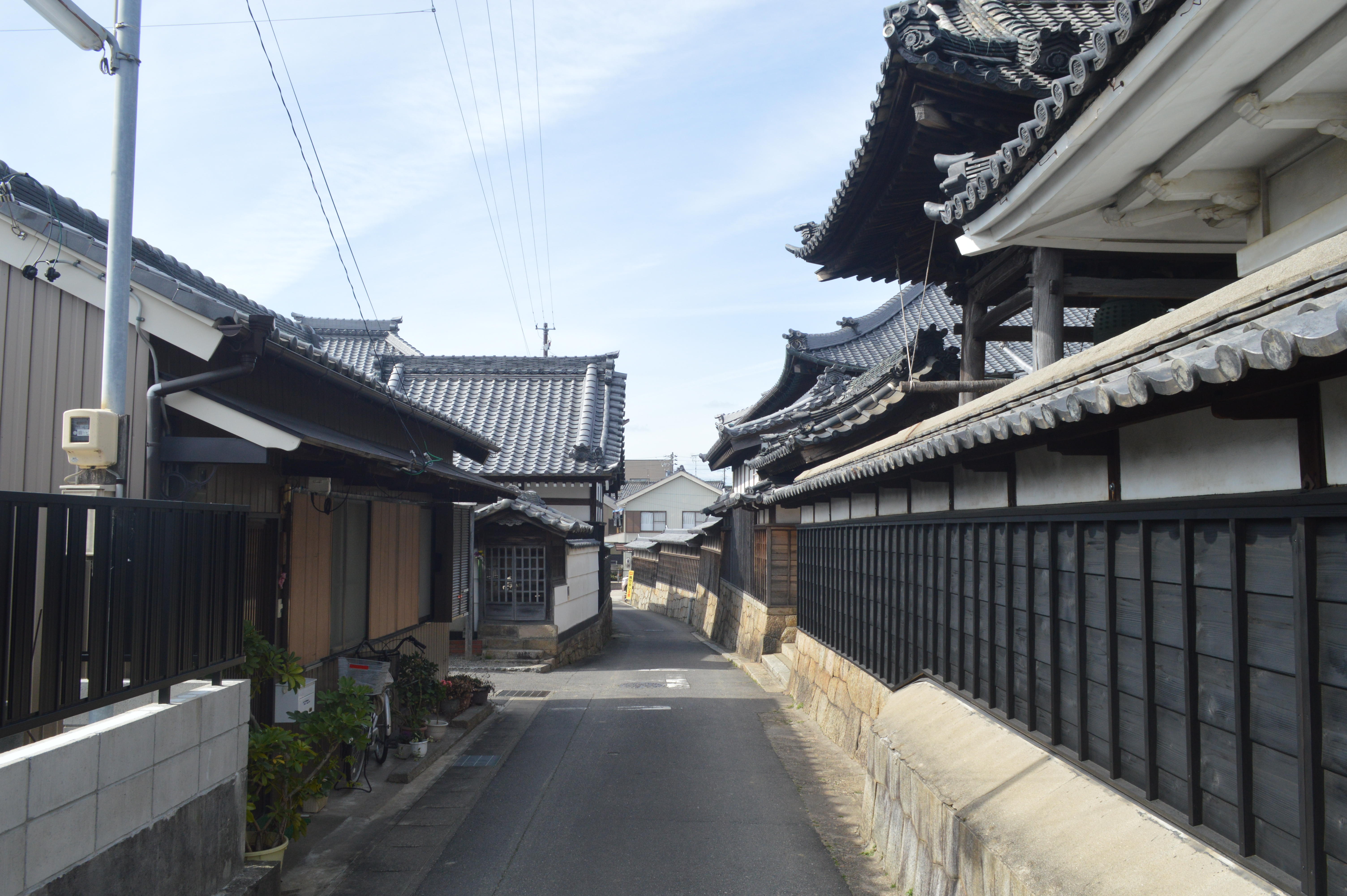 愛知県西尾市の順海通り。